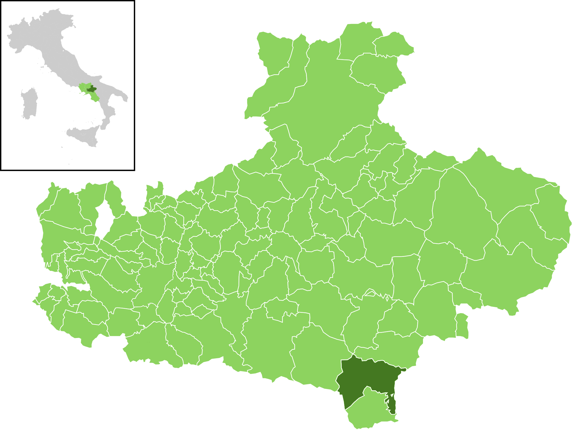 Il comune all'interno della provincia di Avellino